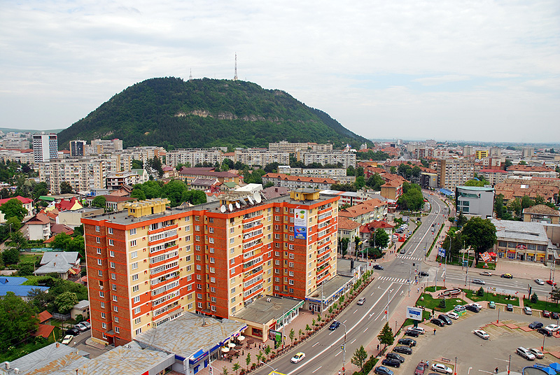 Aerial view of Piatra Neamţ, Romania